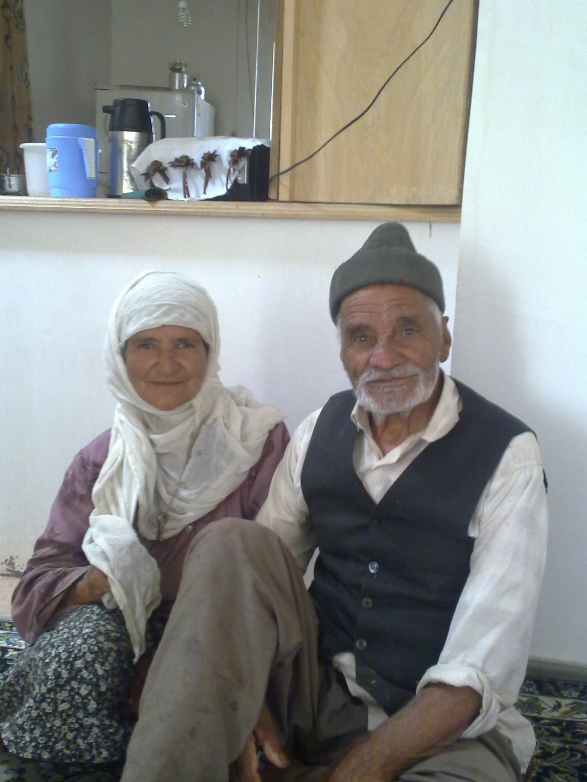 زندگی خانوادگی نسل قدیم